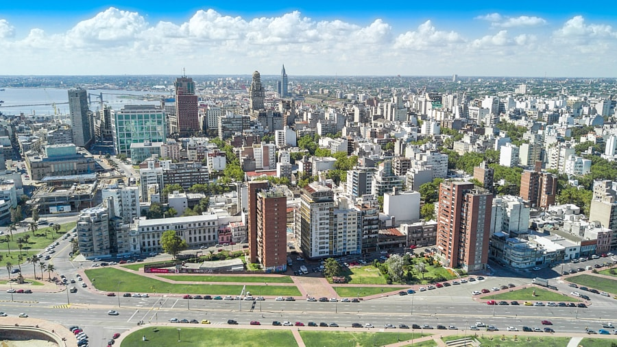 Городской пейзаж Монтевидео